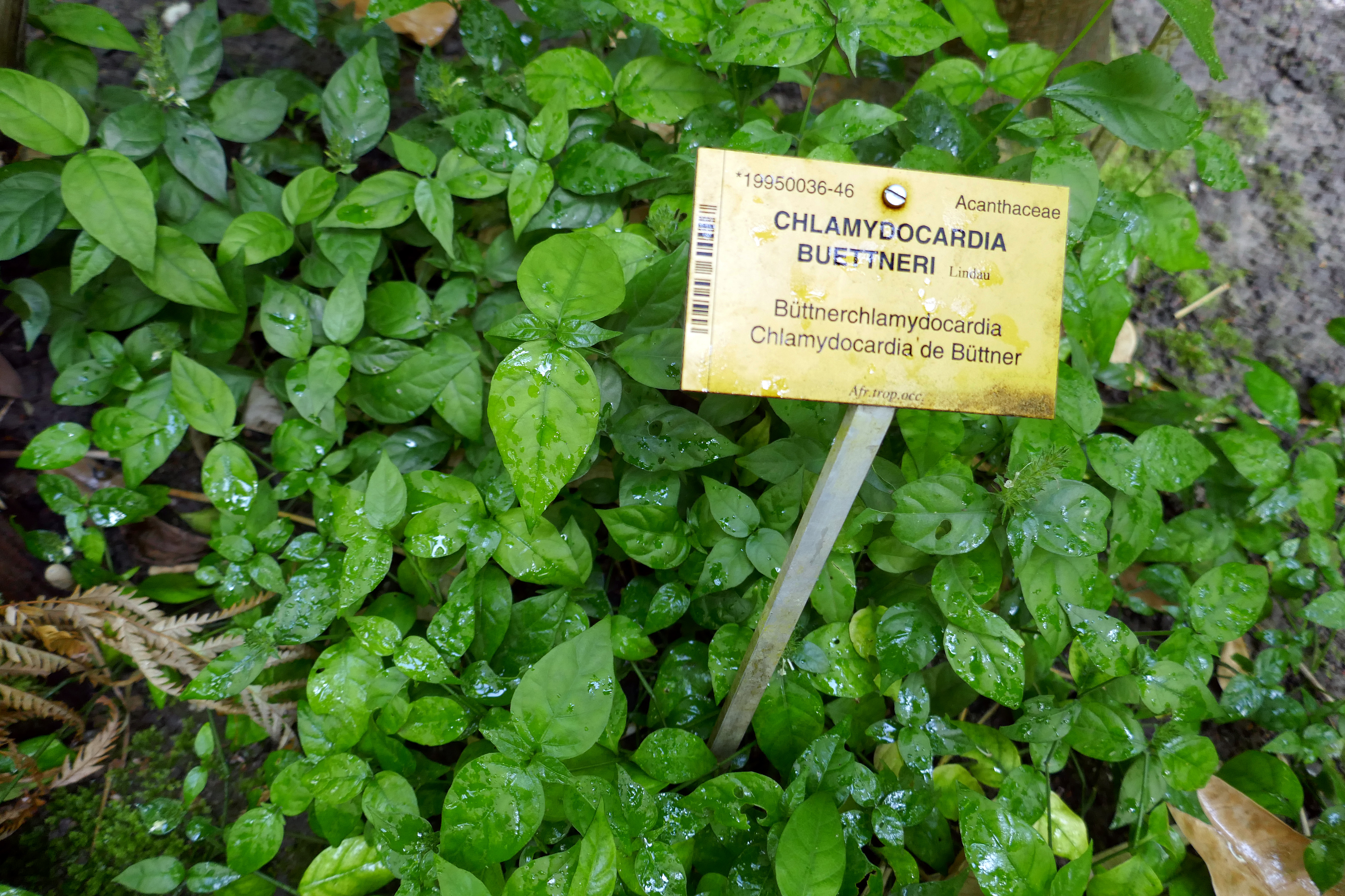 Chlamydocardia buettneri Lindau nl : Büttnerchlamydocardia fr : Chlamydocardia de Bûttner Afrique tropicale occidentale. Jardin botanique Meise (Belgique)